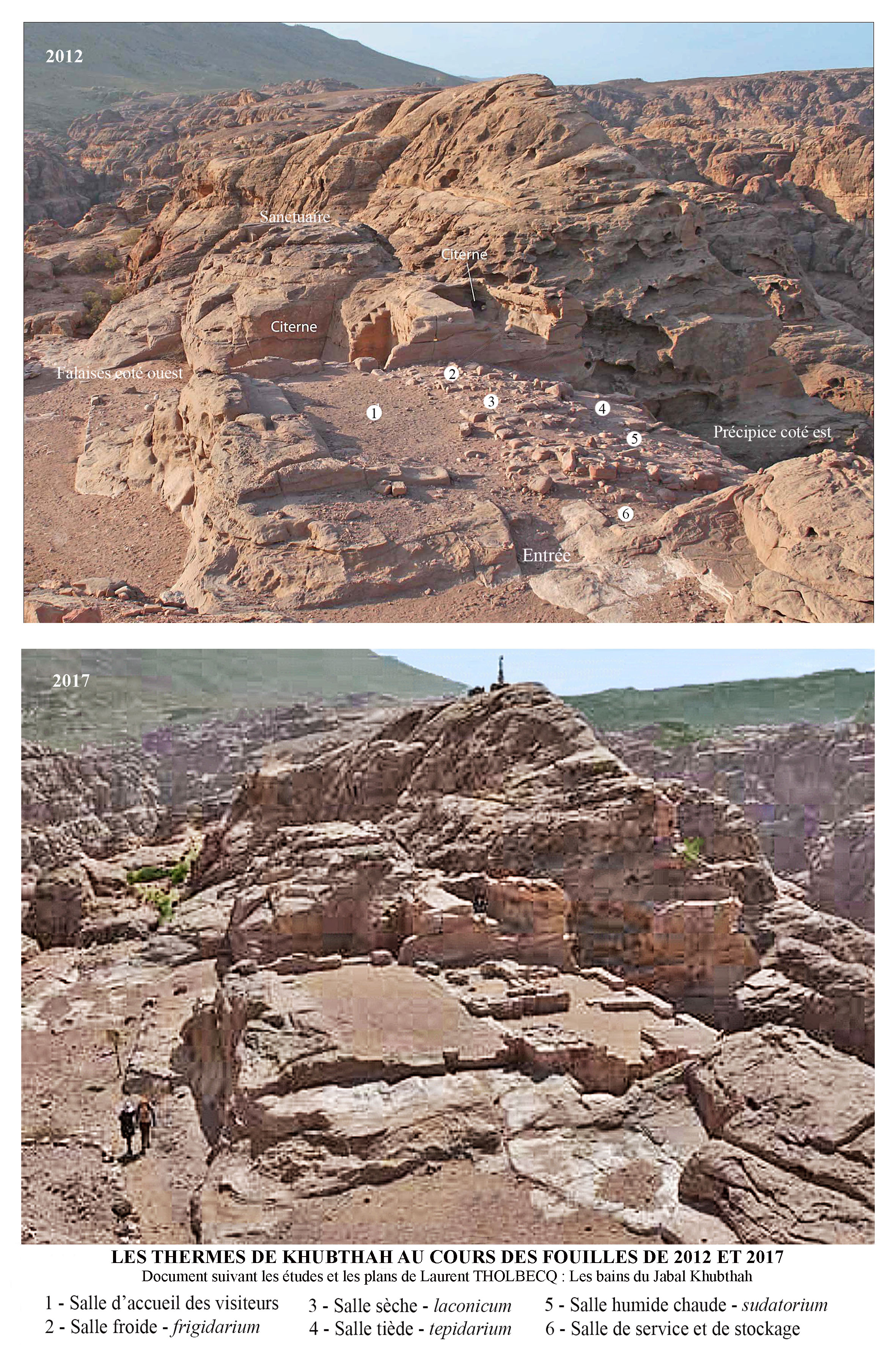 Les thermes de Khubthah au cours des fouilles de 2012 et 2017 par l'archéologue Laurent Tholbecq et son équipe.